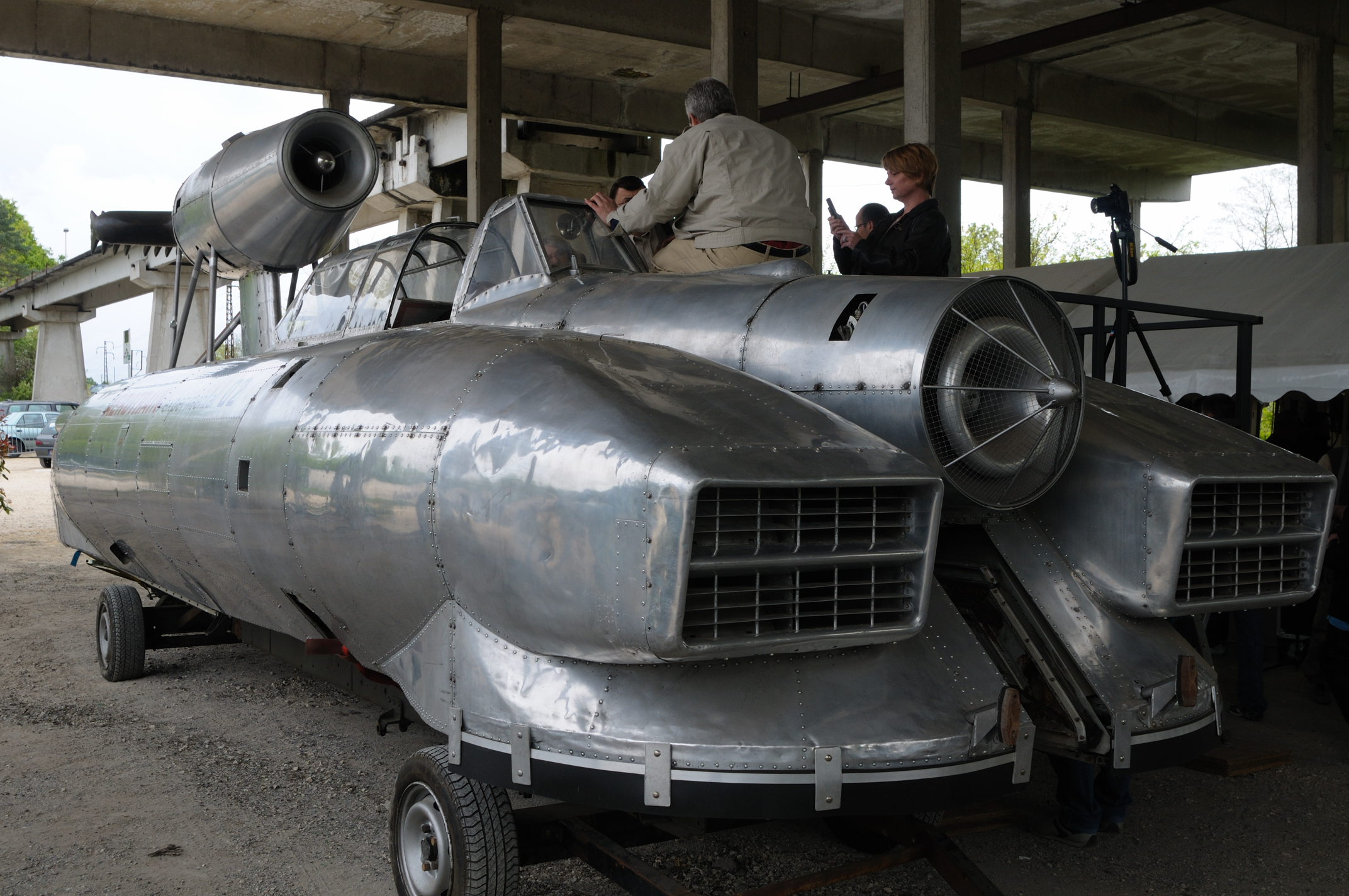 Prototype 02 de l'aérotrain conçu par Jean Bertin lors d'une exposition à Saran, Loiret, France